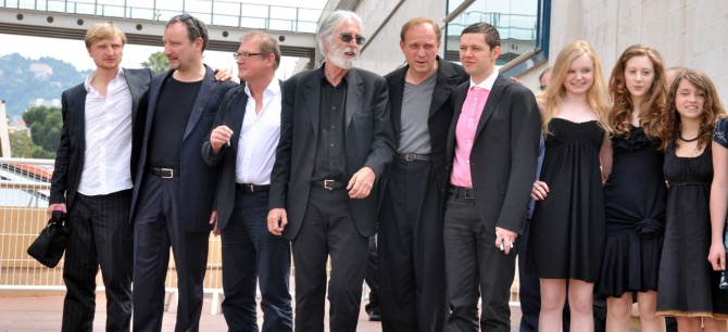 L'équipe du film Le ruban blanc au festival de Cannes